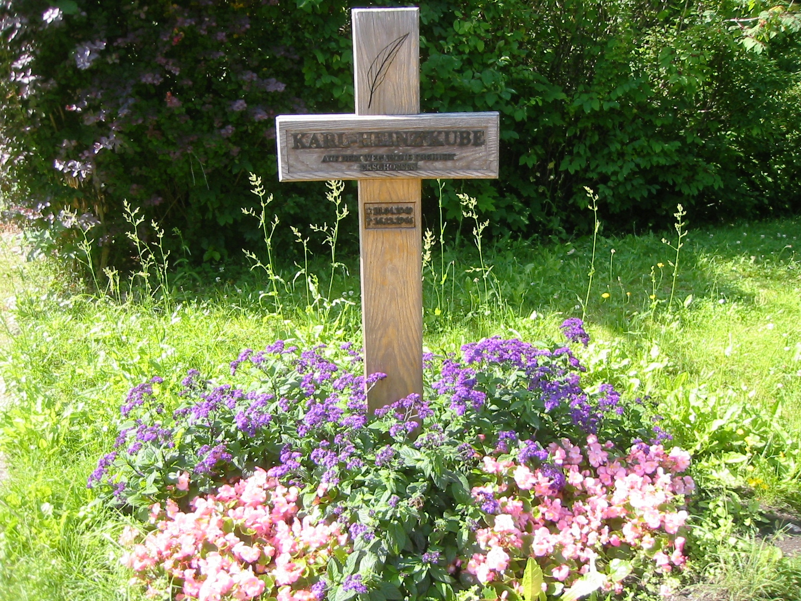 Karl-Heinz Kube (* 10. April 1949 in Ruhlsdorf; † 16. Dezember 1966 in Berlin) war ein Todesopfer an der Berliner Mauer. Angehörige der Grenztruppen der DDR erschossen ihn bei einem Fluchtversuch aus der DDR in Kleinmachnow. Das Gedenkkreuz befindet sich im Wendekopf der Berlepschstraße in Berlin-Zehlendorf.